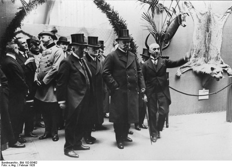 Reichspräsident von Hindenburg besucht die große Jagdausstellung in den Grünen Woche in Berlin! Reichspräsident von Hindenburg in der Ausstellung beim Besichtigen wertvoller Jagd-Trophäen.